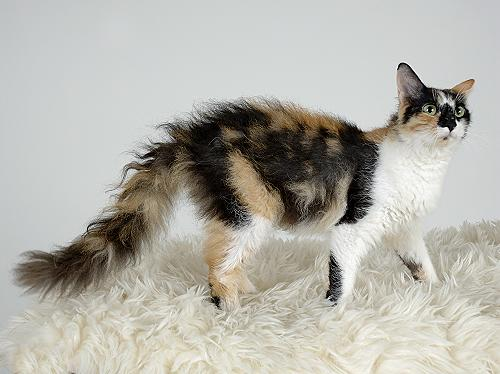 LaPerm cat